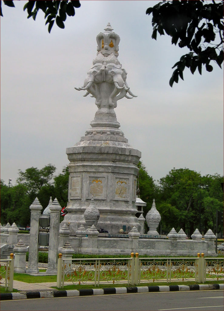 Erawan Monument near Sanam Luang, Bangkok